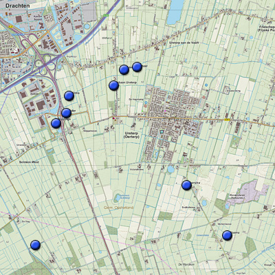 Positiekaart van voormalige windmotoren rondom Ureterp, op basis van de OpenTopo achtergrond van mijzelf.